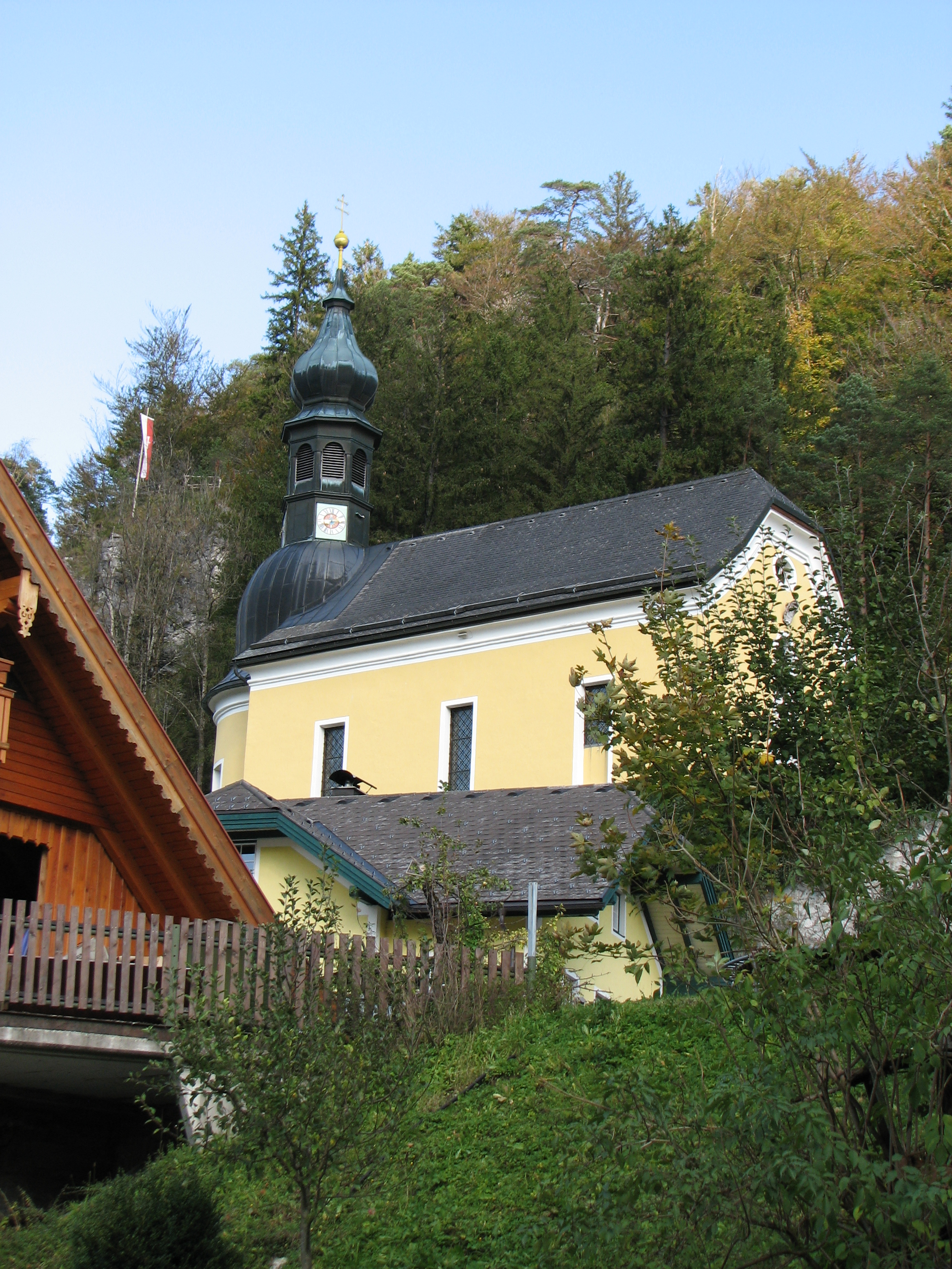 Kath. Pfarrkirche hl. Florian